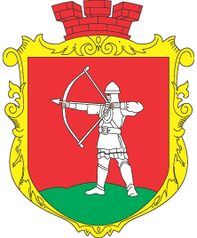 Герб смт. Локачі